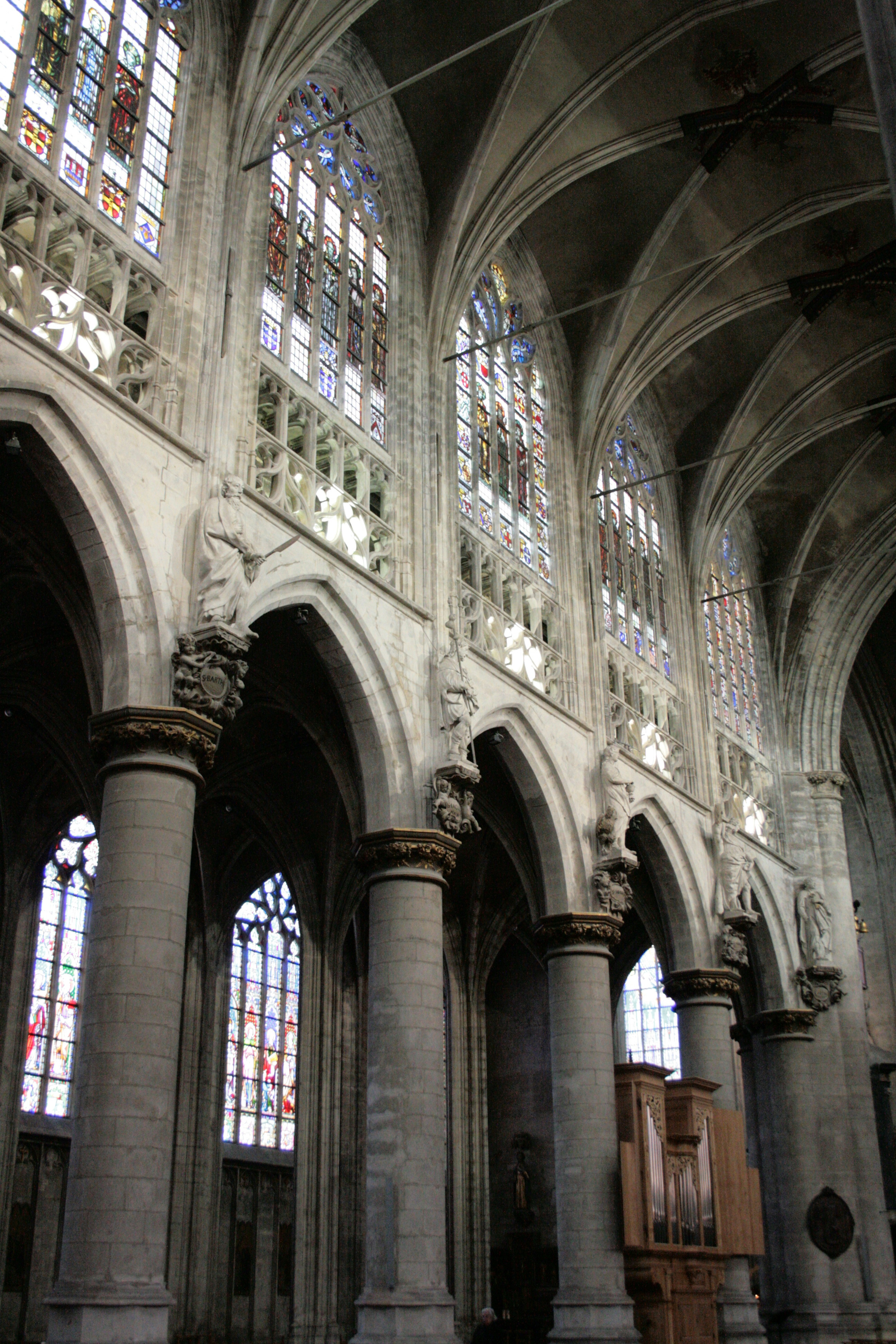 Église Notre-Dame du Sablon, Bruxelles (Belgique). Statues d'apôtres (1641-1646) dans la grande nef